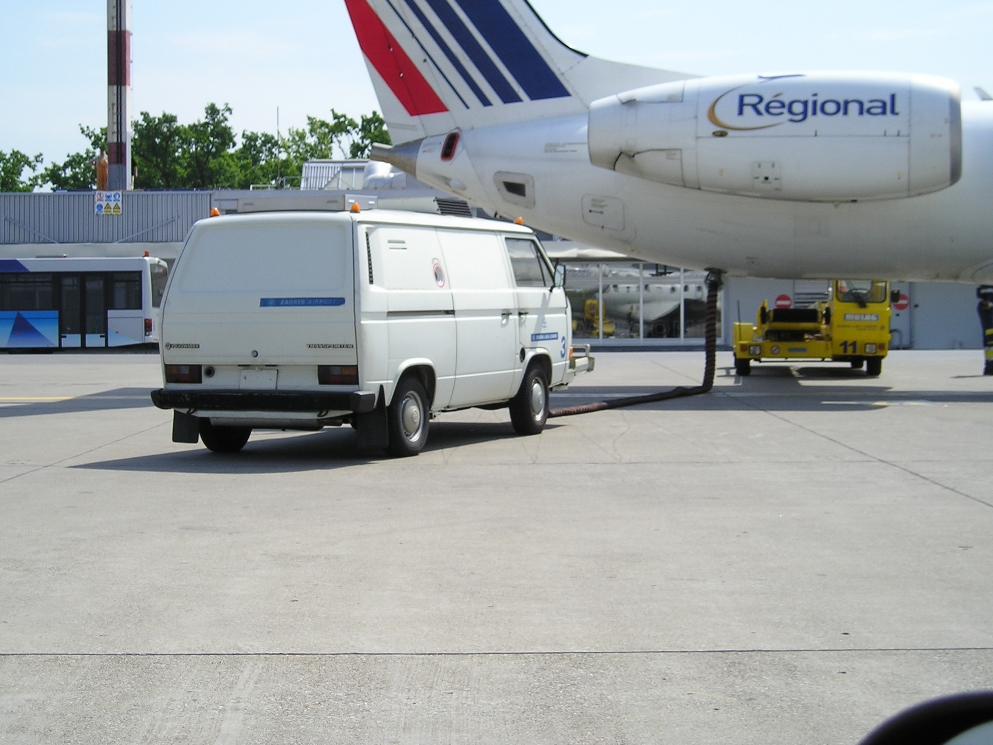 Jet air starter